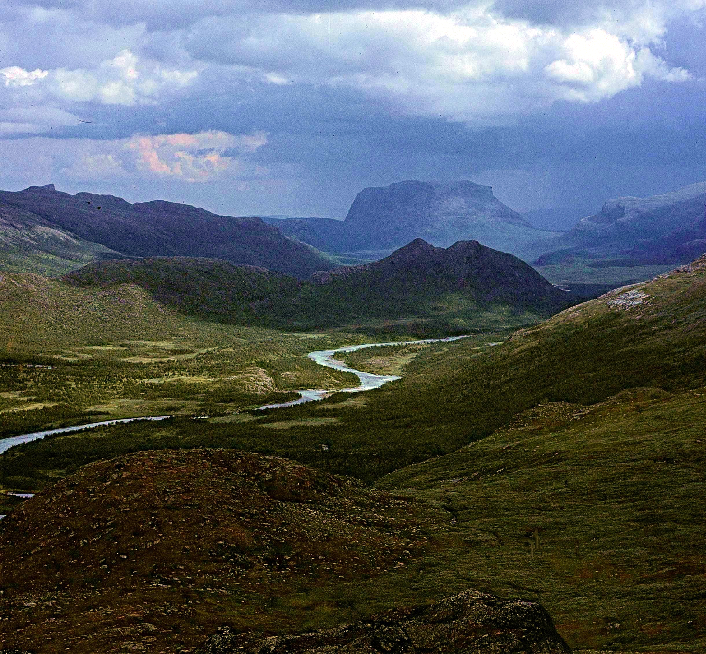 Rapadalen i Sarek, Tjakkeli i bakgrunden